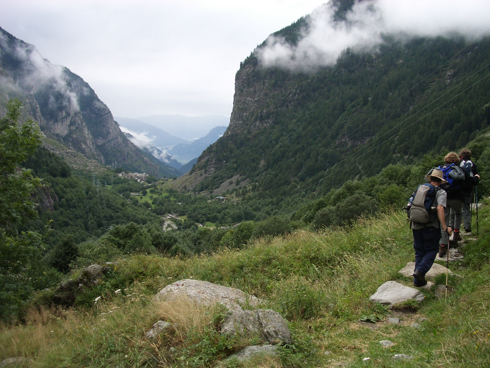 Via Spluga, Italy